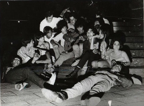 Tanguito tocando la guitarra en Plaza Francia, acompañado por un grupo de hippies (o "náufragos".